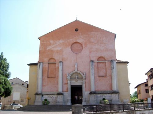 Pordenone - Duomo di San Marco, Concattedrale della Diocesi di Concordia-Pordenone